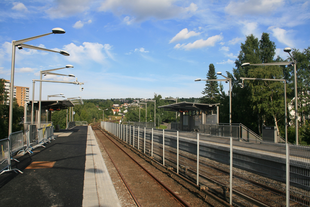 Hellerud T-banestasjon sett mot Tveita (i nord) og Godlia (i sør).